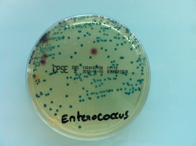 culture d'Enterococcus sur CPSE